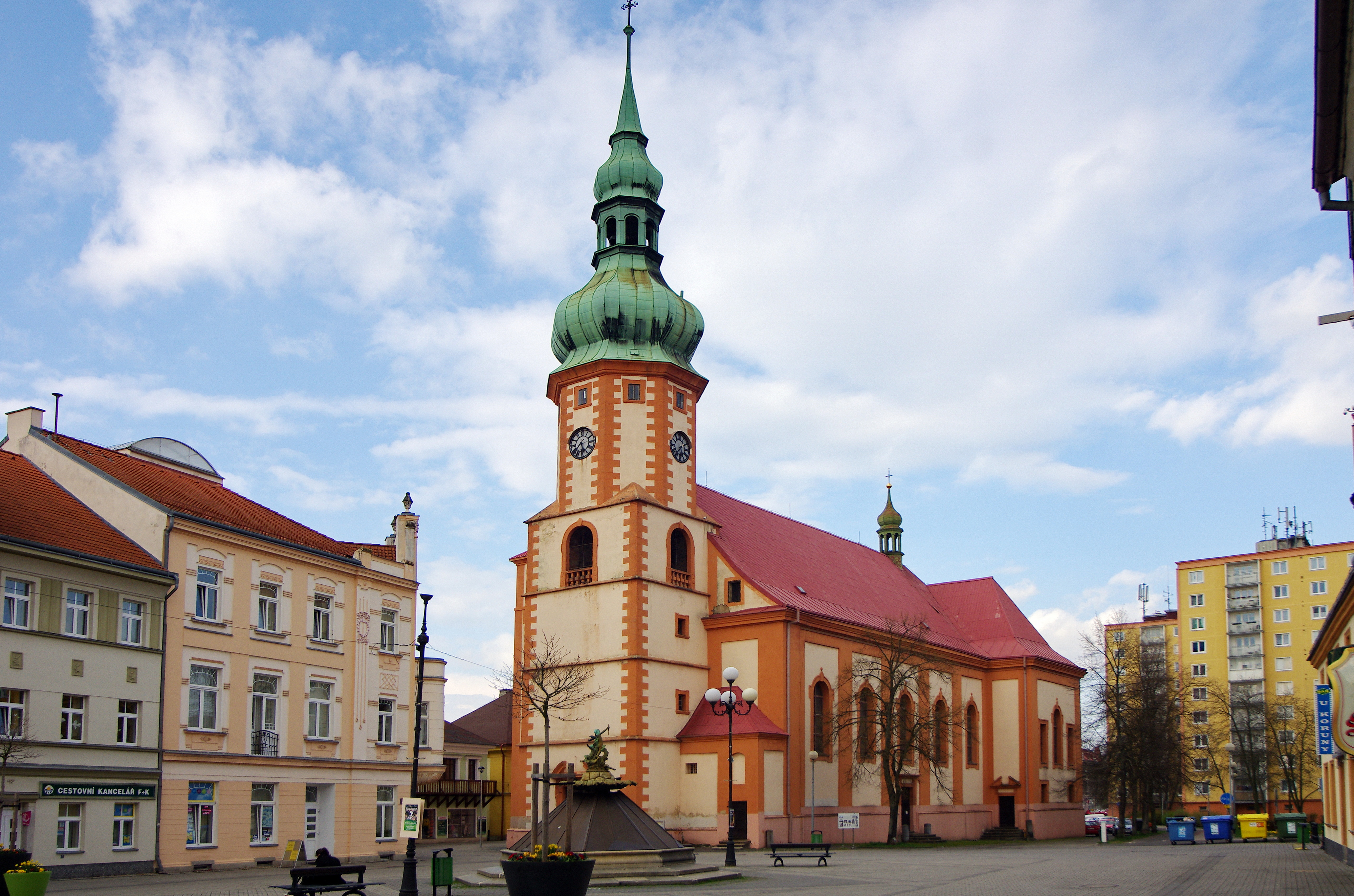 Kostel svatého Jakuba, Staré náměstí čp. 1, Růžové náměstí, Sokolov.